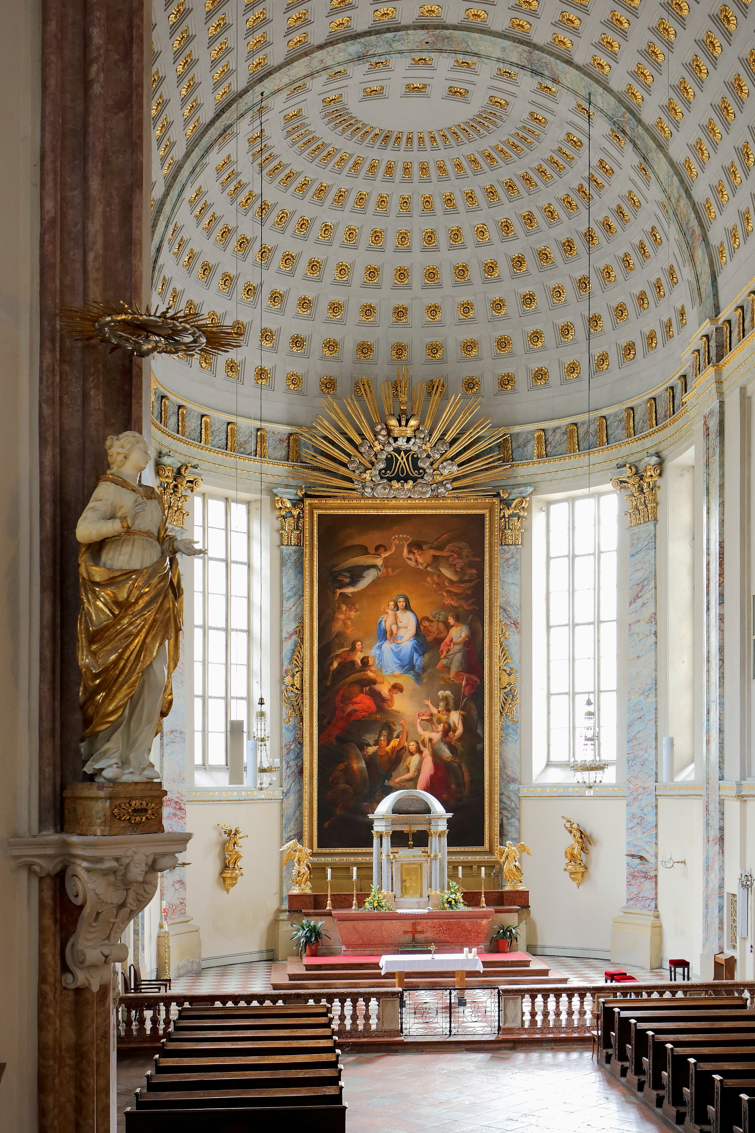 Altarraum der Kirche am Hof, auch Kirche zu den neun Chören der Engel bezeichnet, im 1. Wiener Gemeindebezirk Innere Stadt.Dieser wurde im Jahr 1789 von dem Architekten Johann Nepomuk Amann im klassizistischen Stil umgebaut, samt Einbau einer kassettierten Halbkreistonne und Apsiskuppel. Das Hochaltarbild mit dem Thema "Maria, umgeben von den neun Chören der Engel" stammt aus dem gleichen Jahr und ist ein Werk von Johann Georg Däringer nach einem Entwurf von Hubert Maurer.